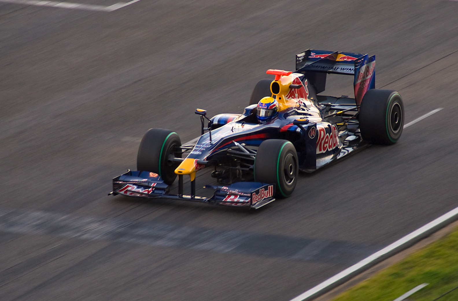 Nikon D90 + Sigma 18-200 DC OS HSM 1/320s - F/8 - 200mm - ISO200